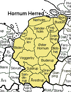 Hornum Herred, Aalborg Amt, Denmark Source: Map by Svend-Erik Christiansen